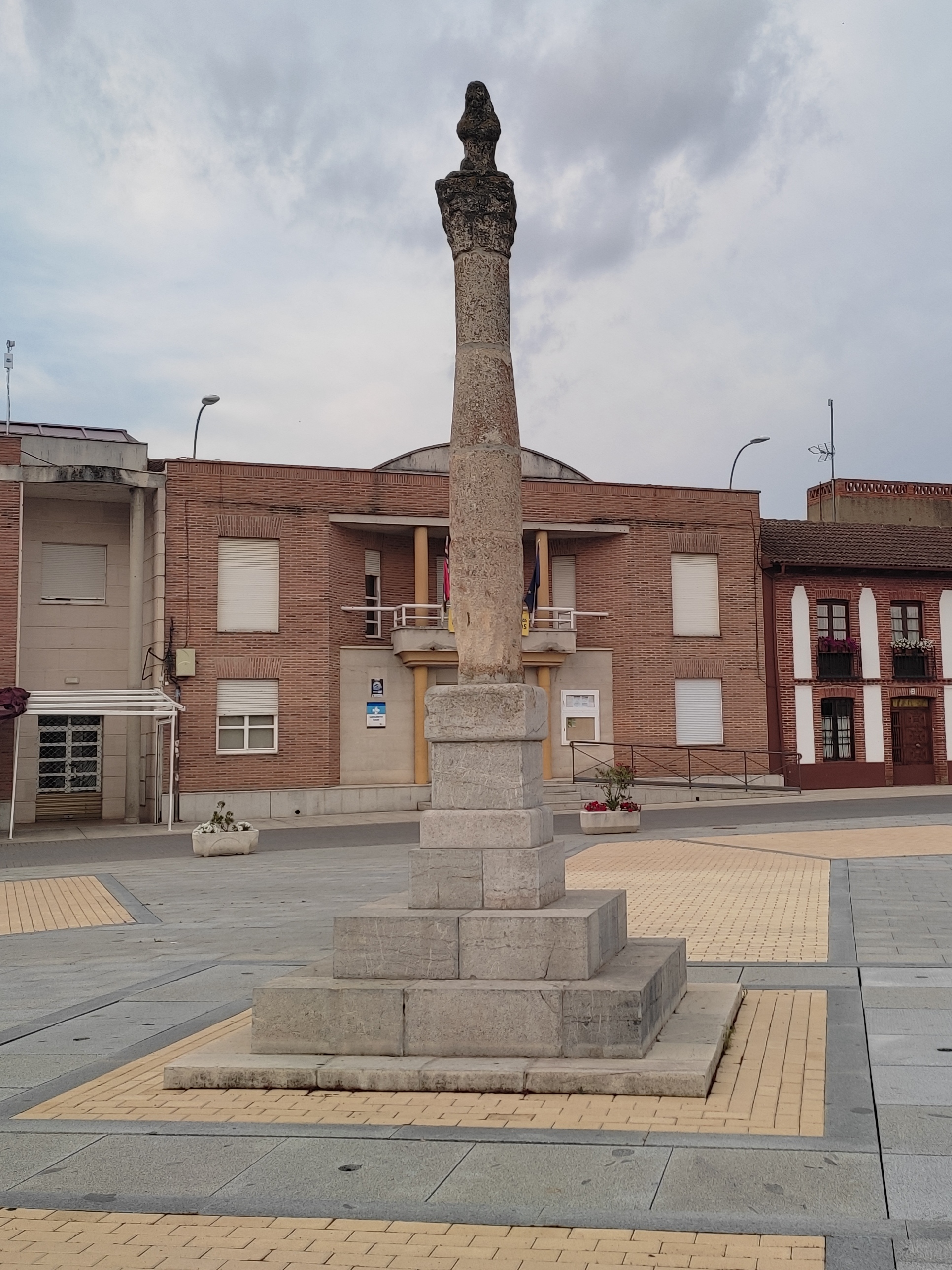 Rollo de justicia de Villademor de la Vega, en la provincia de León, comunidad autónoma de Castilla y León, España. Erigido en el siglo XVII para señalar la emancipación jurisdiccional de la villa, está formado por una columna con éntasis, capitel corintio y la figura de un león. Bien de Interés Cultural desde 1963. Más información